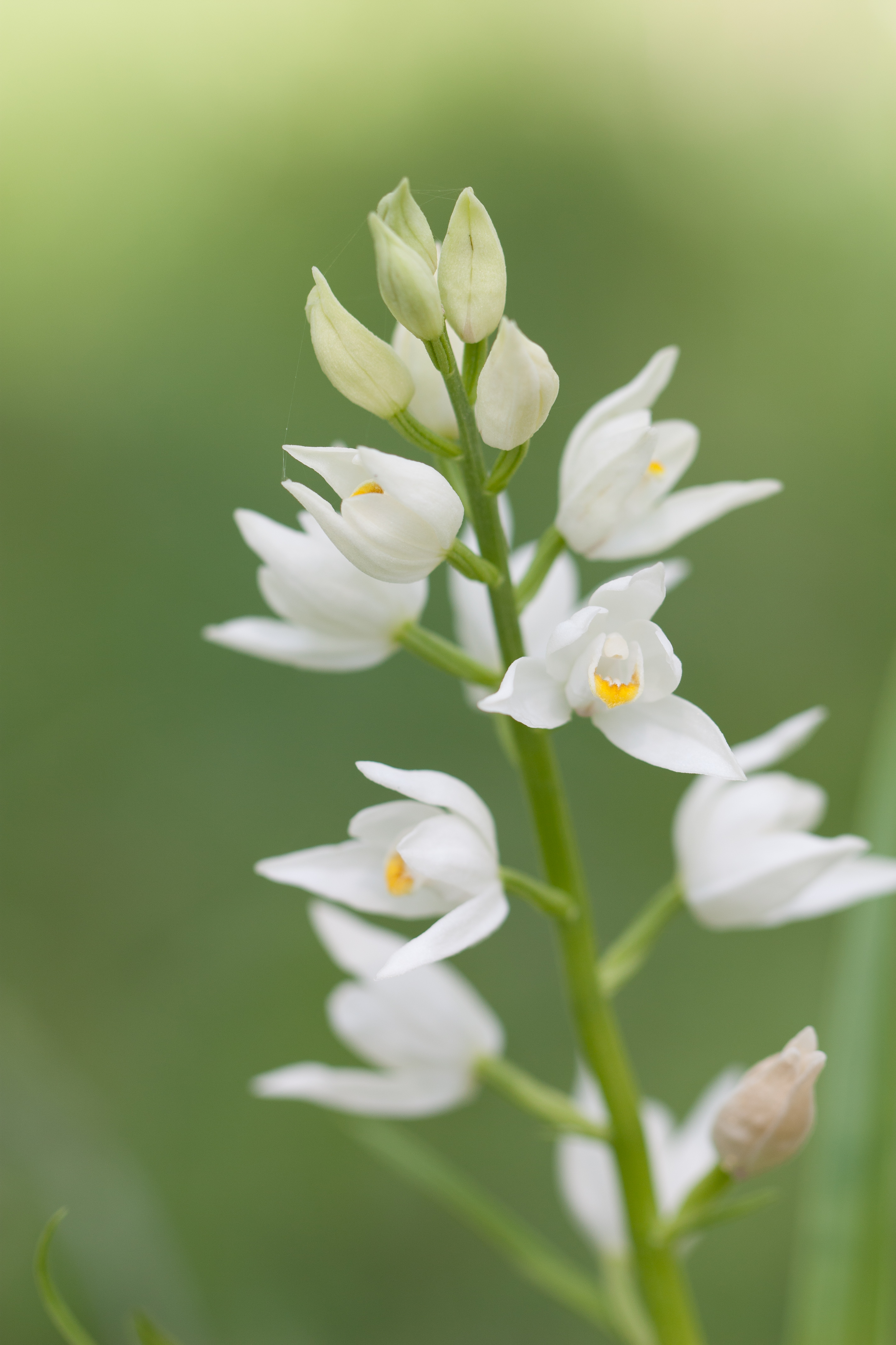 Orchidée non identifiée